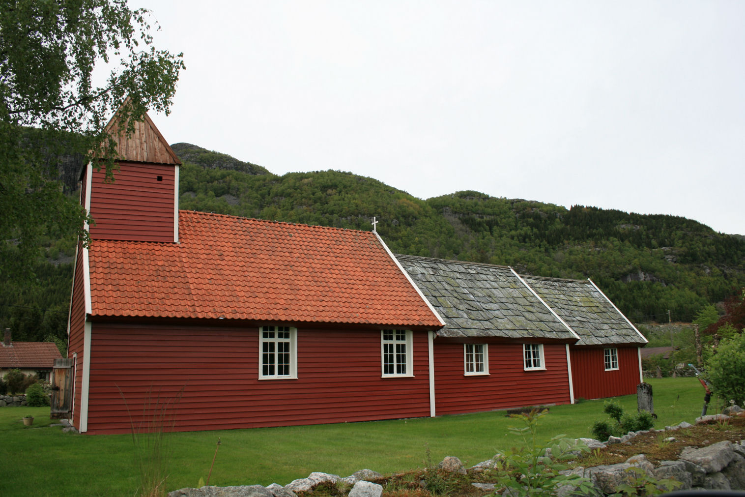 Årdal gamle kirke, Hjelmeland, Rogaland